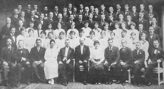 Республіканська Капела під проводом О. Кошиця в Празі (Чехословаччина, квітень 1919 р.)